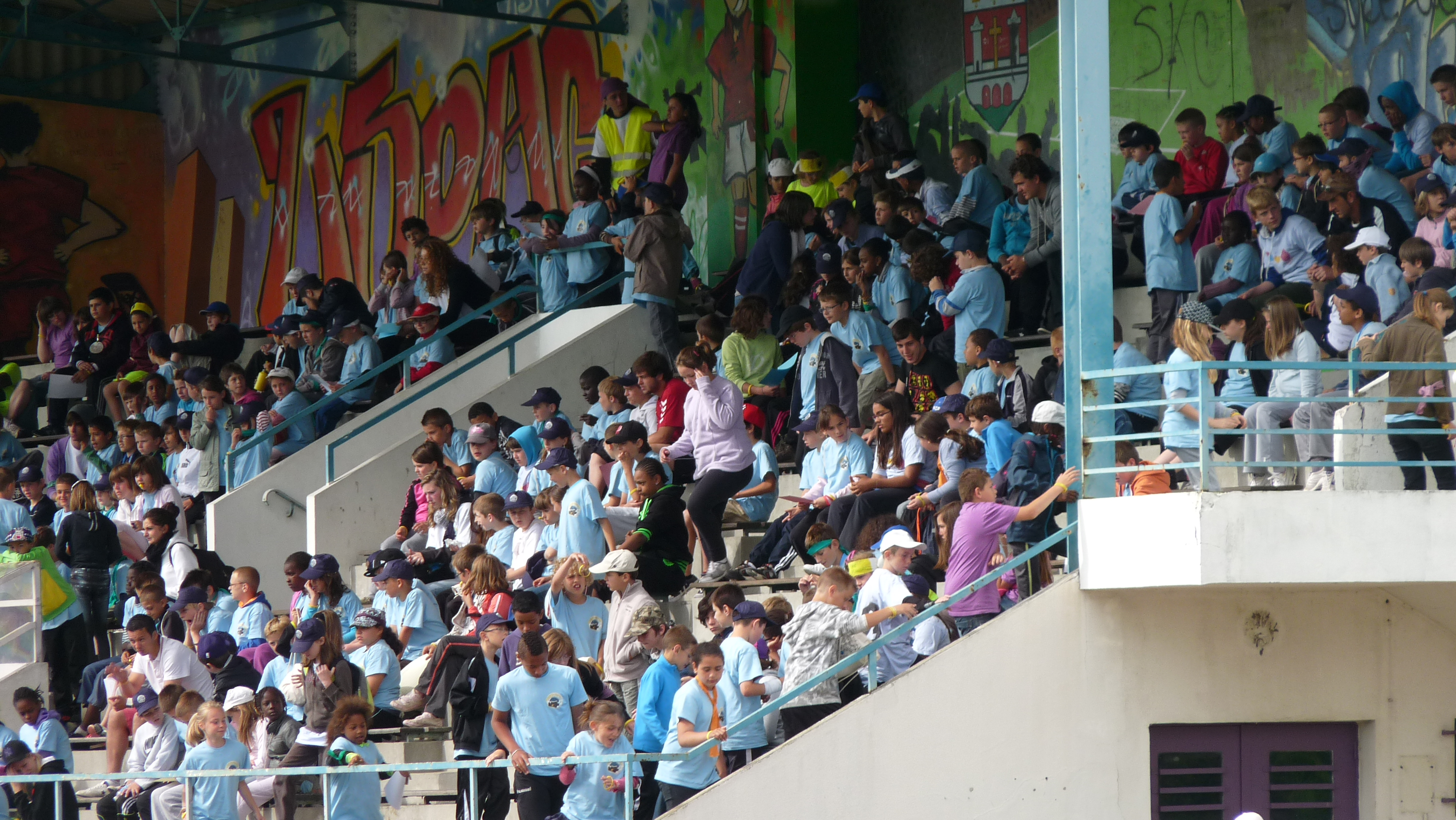 Gradins du stade Jacques-Havet (Pont-de-l'Arche) durant la première édition des Olympiades 276 (juillet 2012).